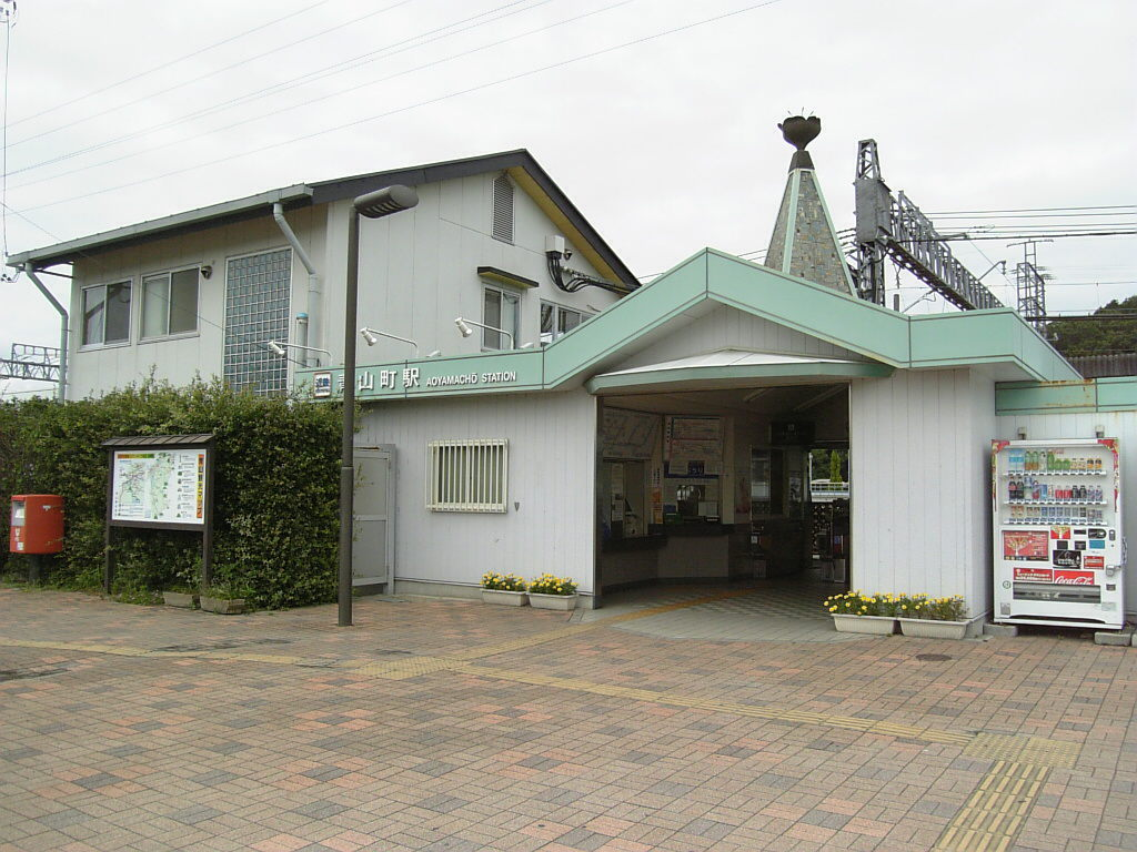 近鉄青山町駅 2007年8月撮影。 機材：V604SH 撮影者：Kansai explorer